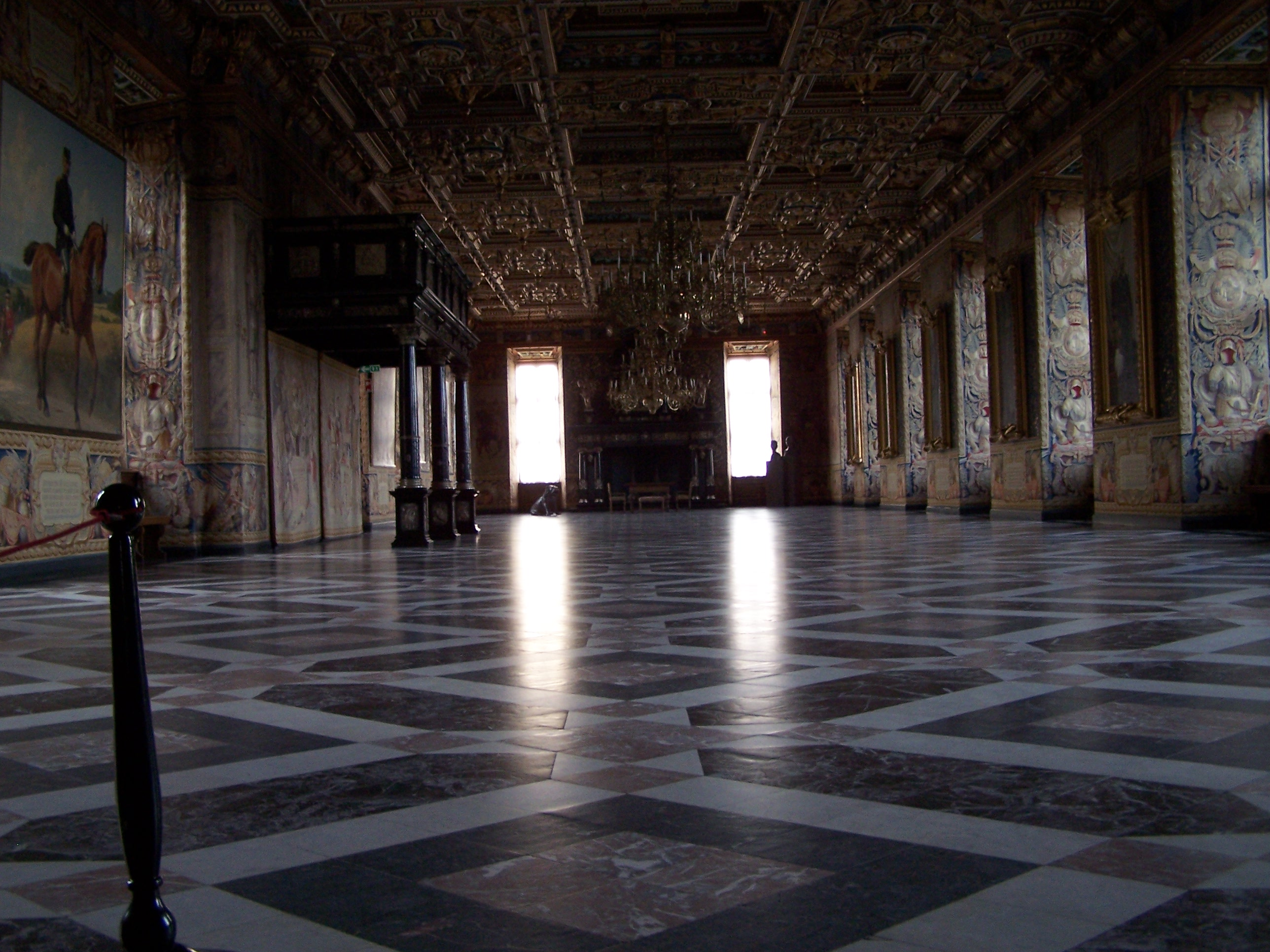 (c) 2005, Niels Elgaard Larsen Knights hall